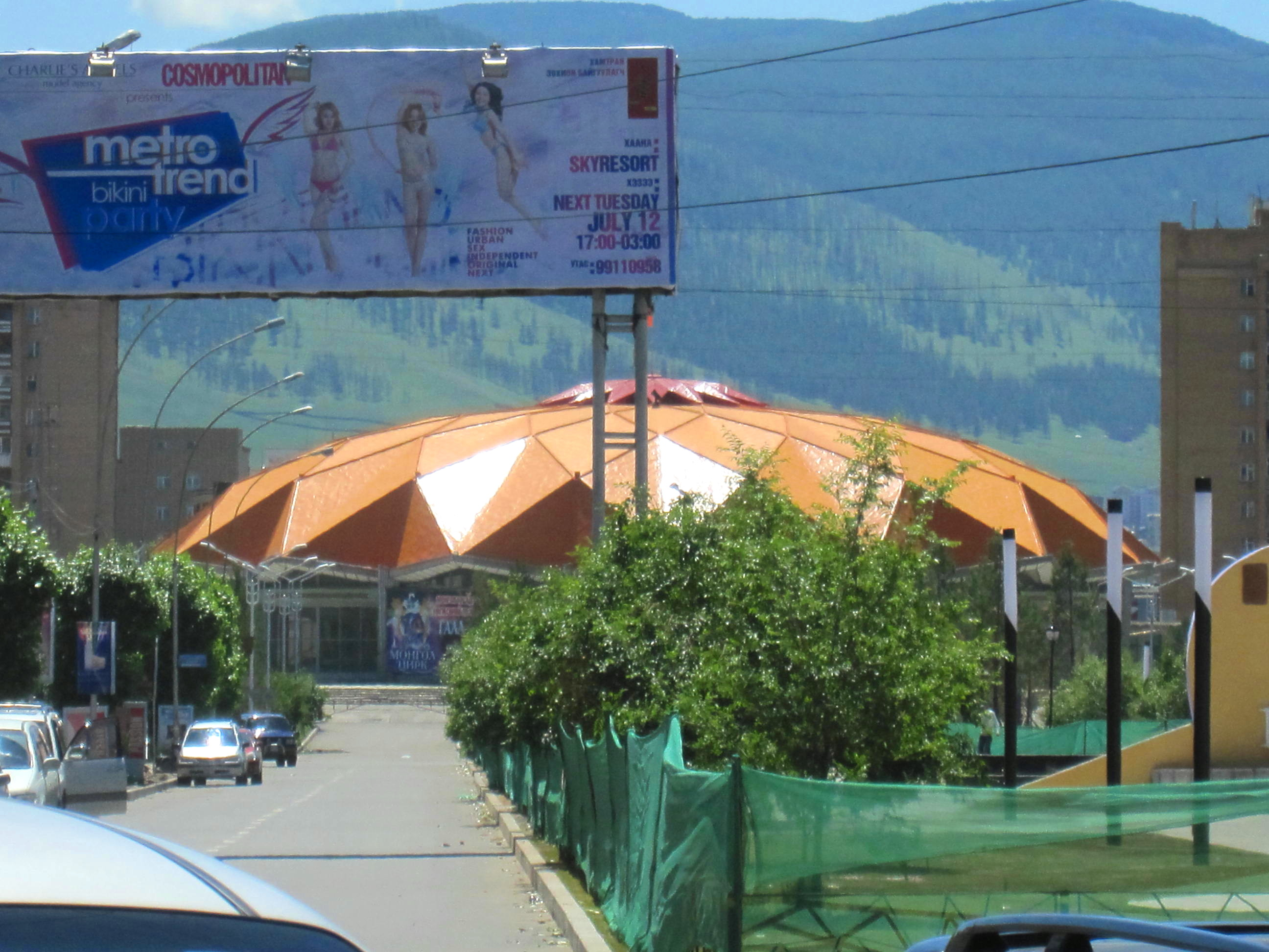 サーカス場（ウランバートル市）